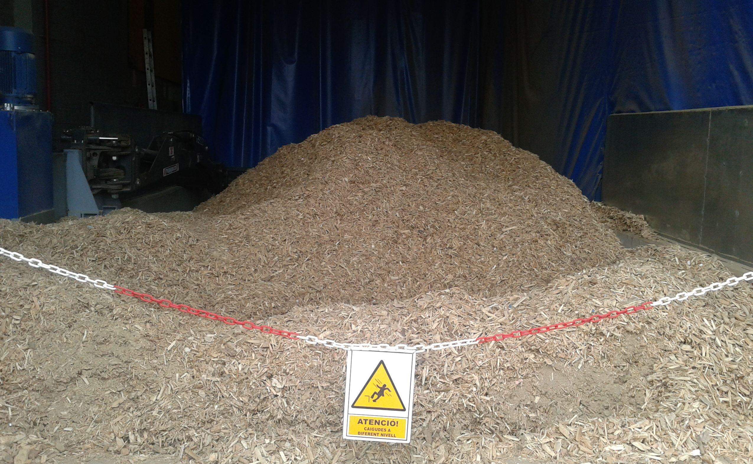 Restes industrials (palets trencats i altres objectes de fusta bàsicament, triturats) emprats com a combustible, considerat biomassa, a la planta de generació de calor per a calefacció i aigua calenta del barri de La Granja a Molins de Rei. En un principi es va pensar usar mobles vells dels veïns, però mai s'ha fet perquè les pintures i els barnissos no es poden cremar a causa de la seva toxicitat. Els residus es compren a uns 35€ la tona a indústries de la comarca. La planta genera cendres que s'aboquen a un abocador i CO2 a l'ambient. A cada habitatge els va costar uns 3.000€ la instal·lació, gràcies als ajuts de la UE, i paguen uns 150€-200€ mensuals a l'hivern de calefacció i escalfament d'aigua. A l'estiu la mensualitat es redueix a uns 40€. Els preus de venda els imposa l'ajuntament de Molins. L'empresa que ho gestiona està format per Aigües de Sabadell SA i Hidrowatt SA.